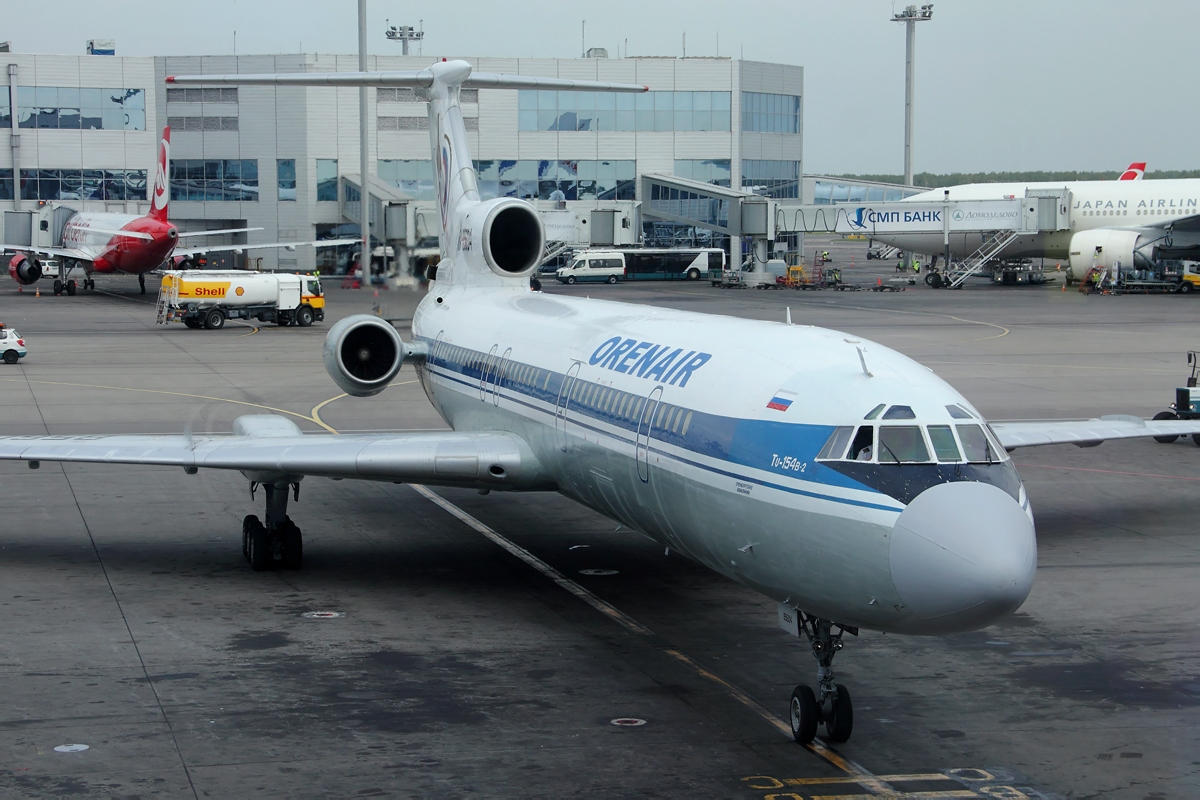 Orenair Tupolev Tu-154B-2